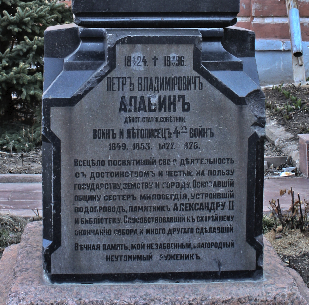 Самара, Иверский женский монастырь